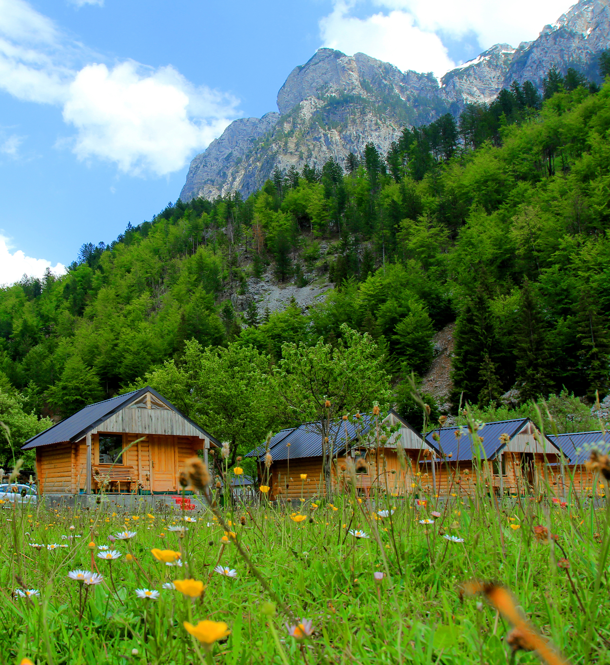 Vila druri në Fshatin turistik - Valbonë